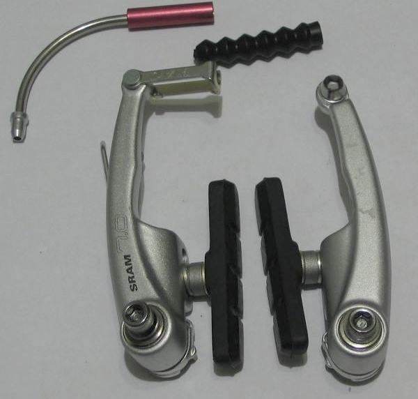 Front V-brake, Sram 7.0